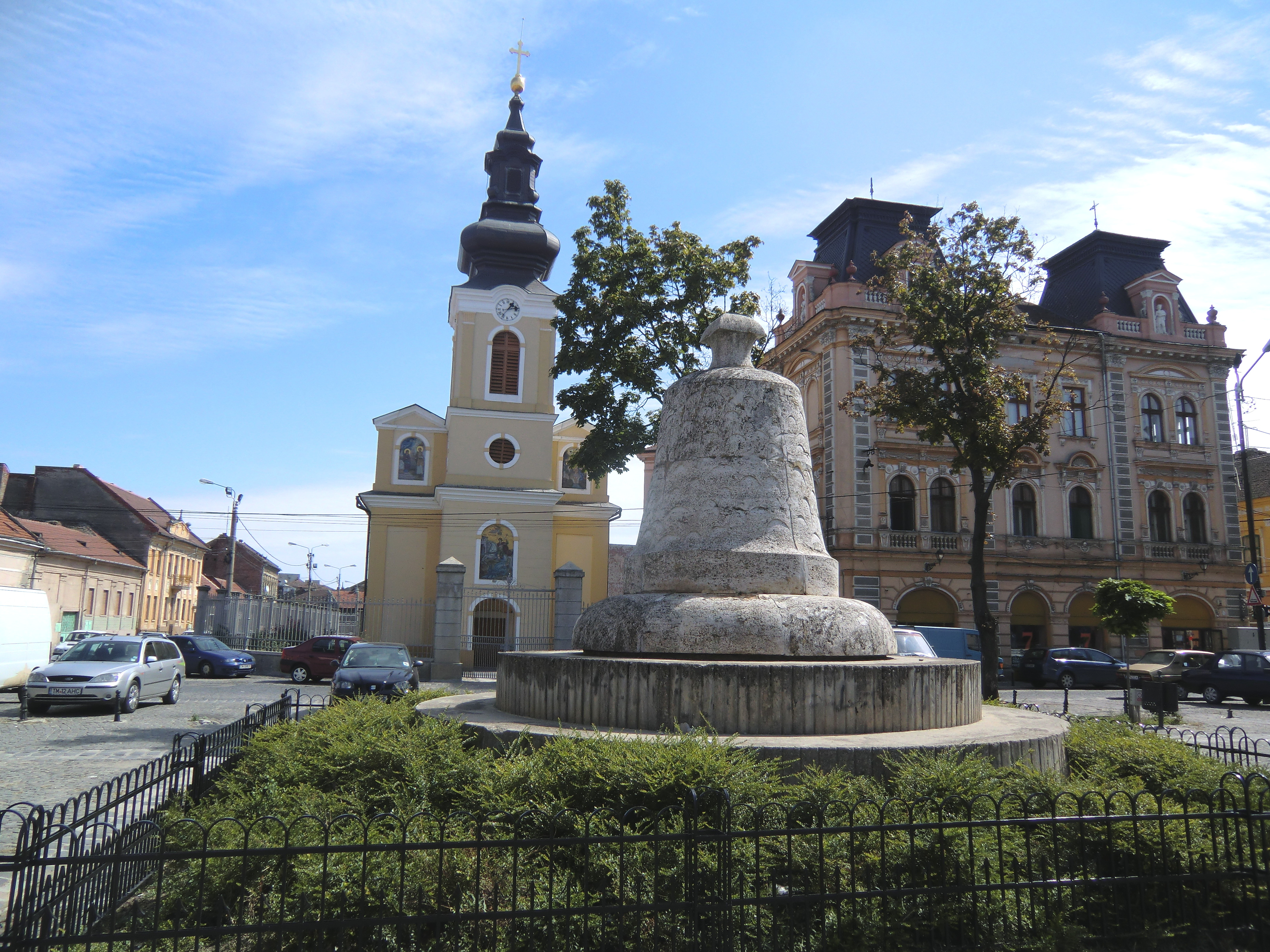 Denkmal "Glocke der Freiheit", Trajansplatz, Timișoara